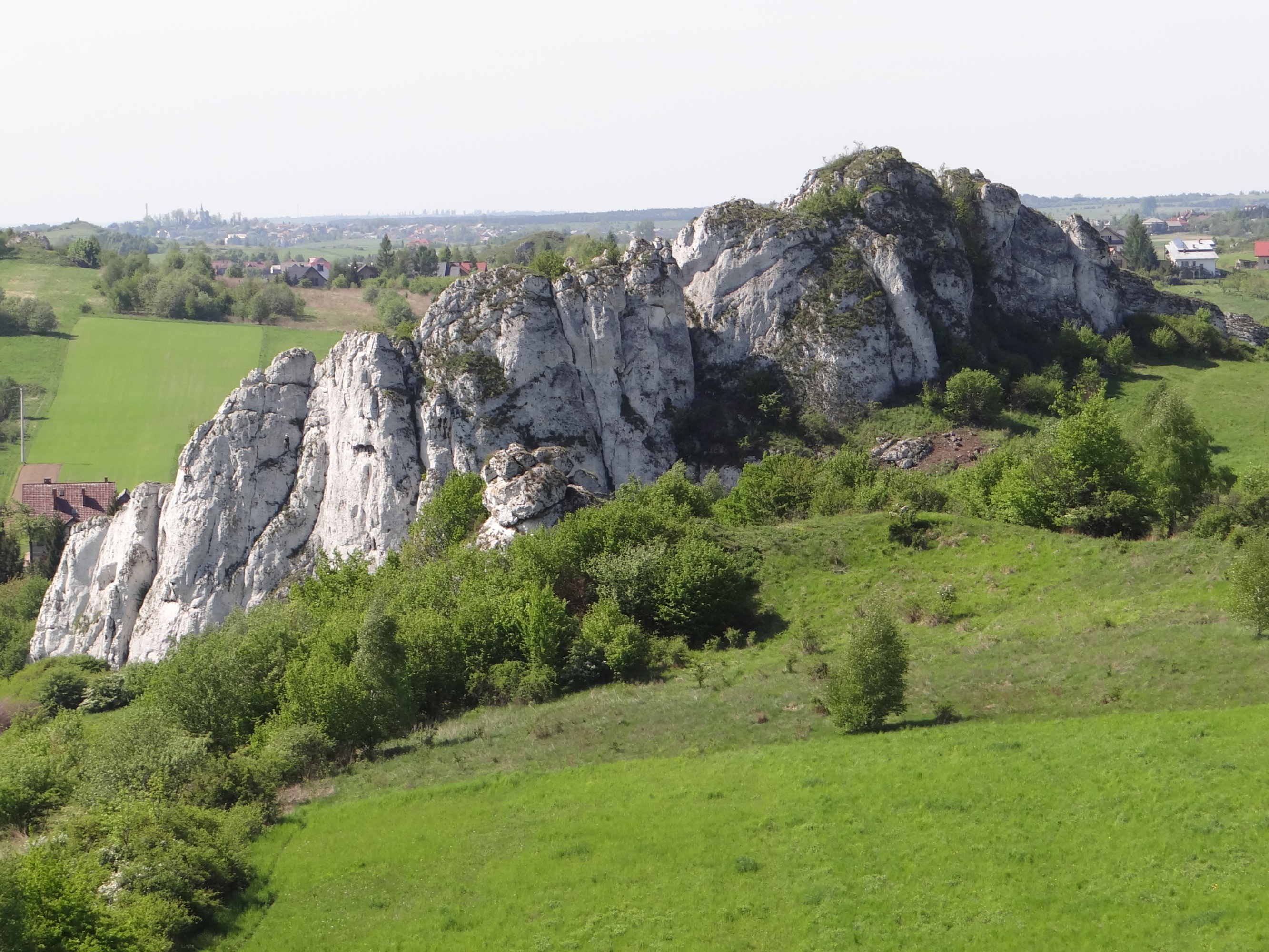 Łysa (Fiala), widok z Wzgórza 502